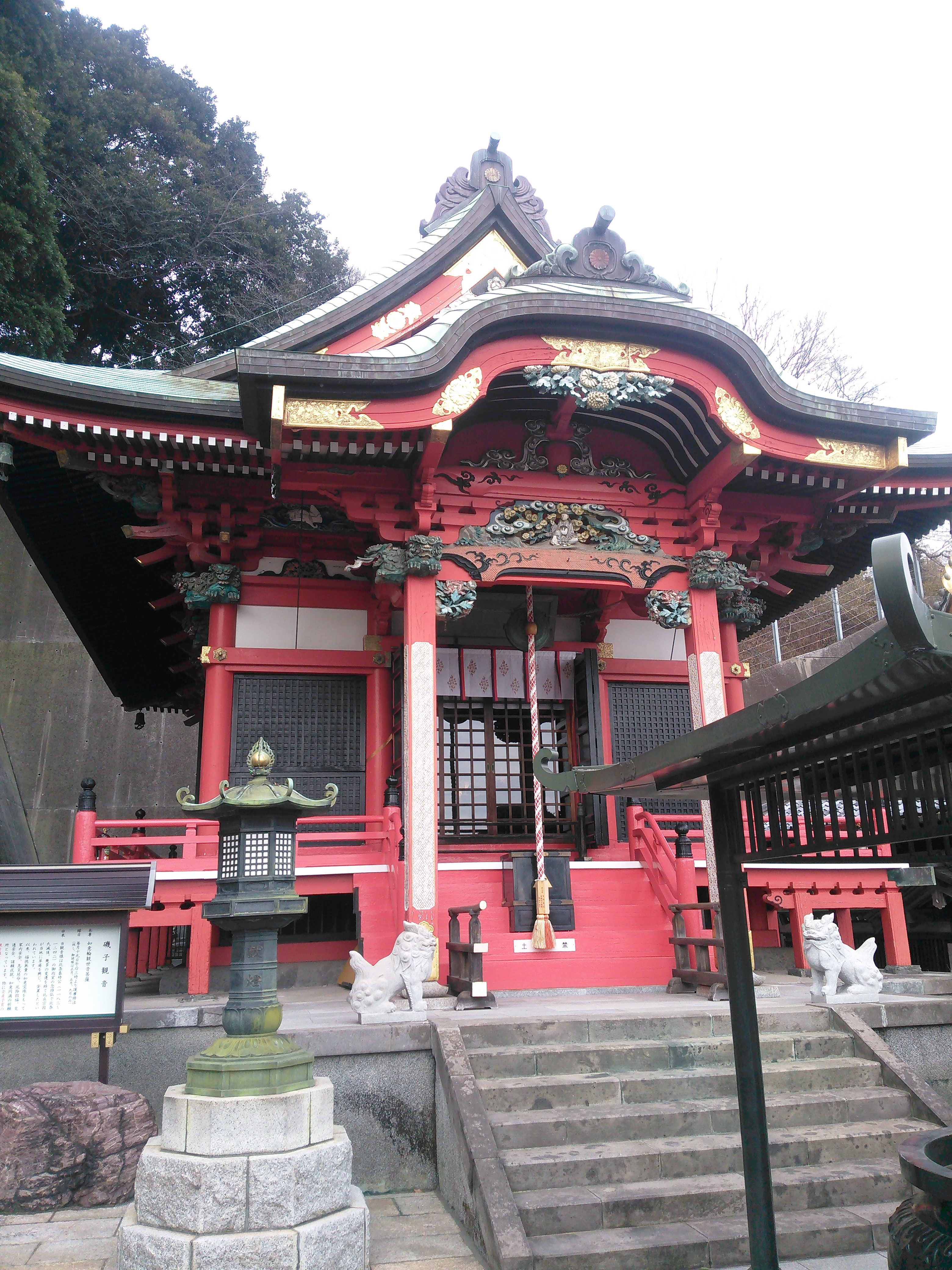 横浜市磯子区、金蔵院磯子観音